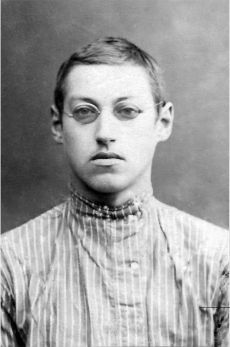 Борис Иванович Вронский (1898—1980) — советский геолог, на фото - студент Киевского коммерческого института, 1915 г.